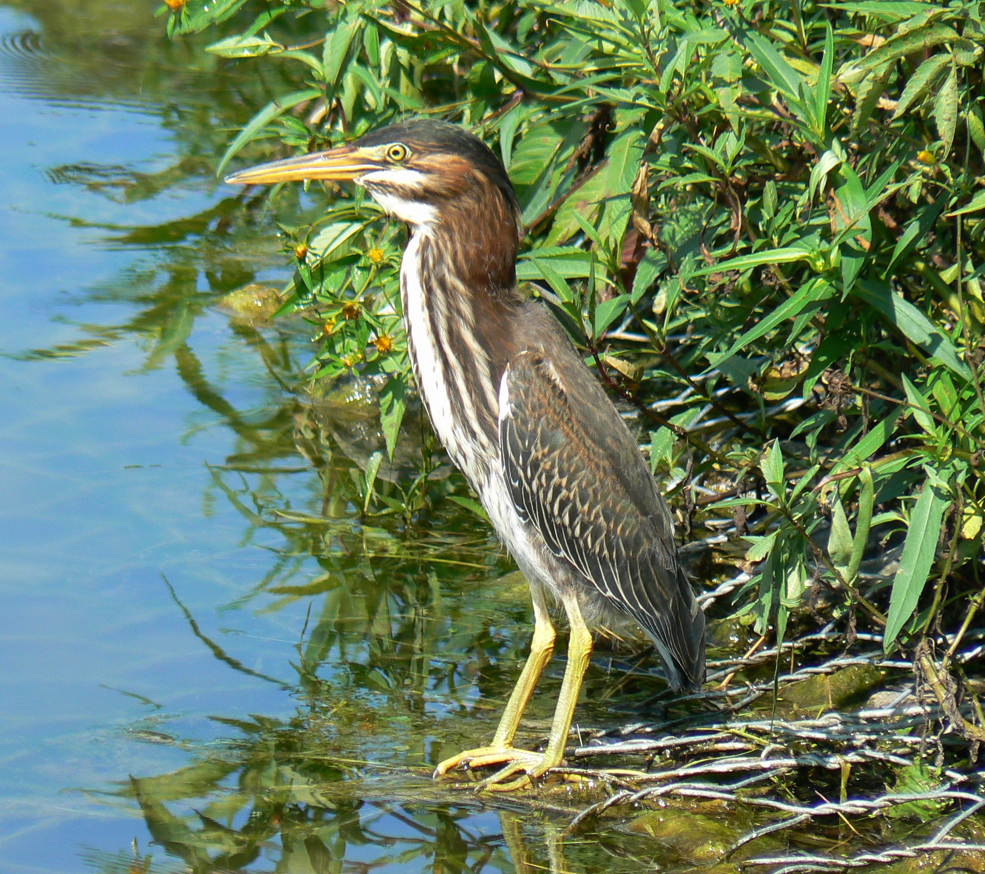 Green Heron